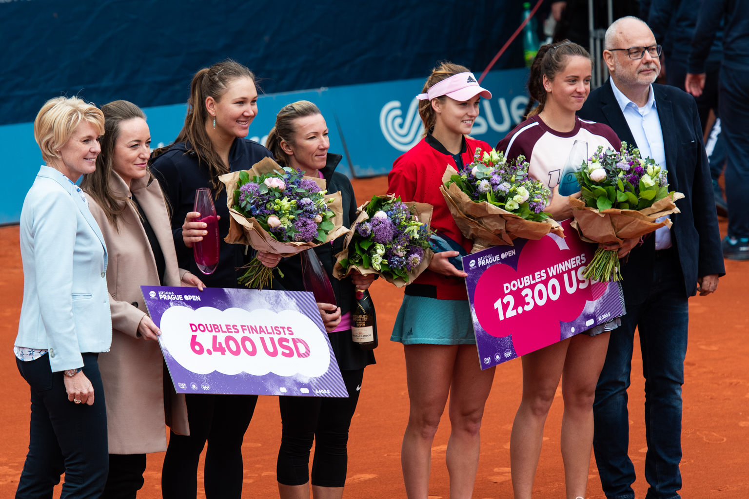 Melichar, Peschke, Kalinskaya & Kužmová